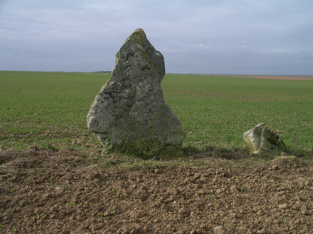 Menhir de la Grosse Devise 2 à Thaon (Calvados)